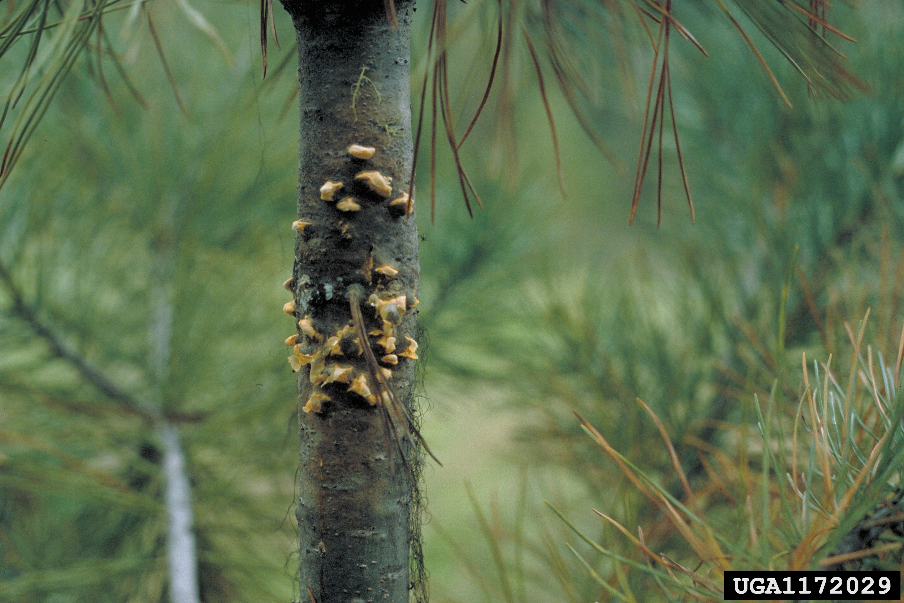 Cronartium_ribicola aecia at Pinus monticola